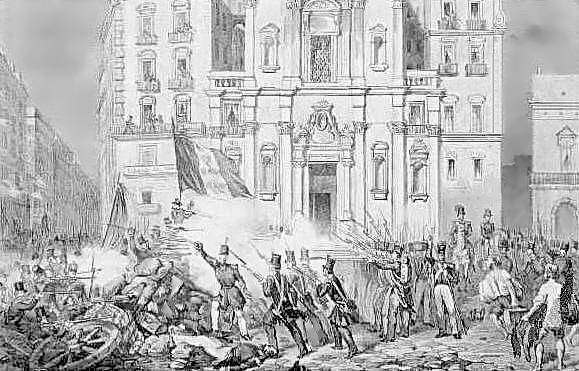 I moti costituzionali del 15 maggio 1848 in Napoli, litografia.